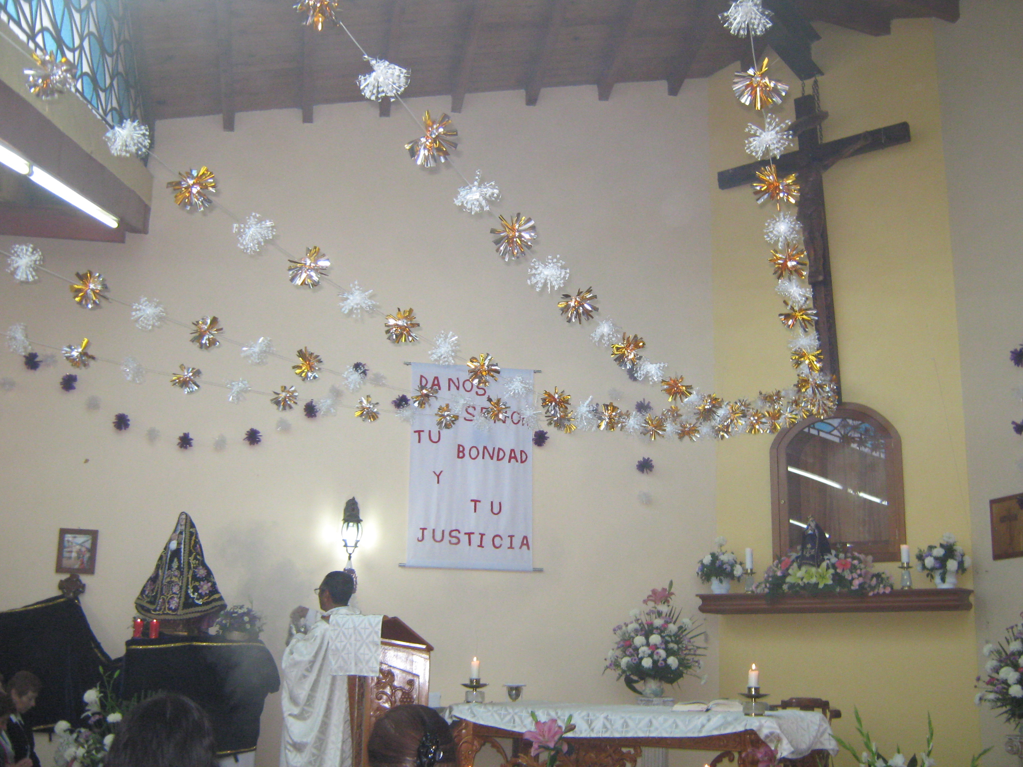 Interior del templo, cuando es la fiesta de la Virgen se cantan las tradicionales mañanitas acompañadas del mariachi se le canta a la Virgen peregrina que esta debajo del nicho y a la virgen de la Capilla que esta colocada al extrema izquierdo.